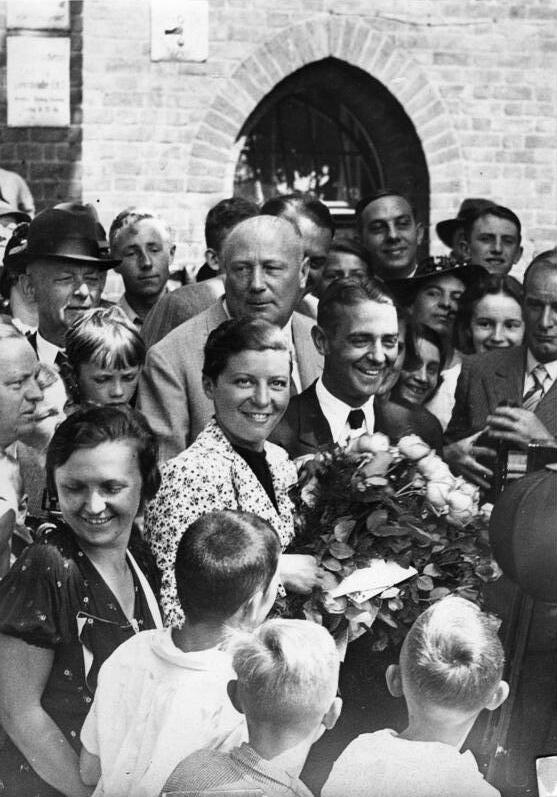 Heirat Elly Beinhorn, Bernd Rosemeyer Berlin.- Hochzeit von Fliegerin Elly Beinhorn und Rennfahrer Bernd Rosemeyer Abgebildete Personen: Rosemeyer, Bernd: Automobilrennfahrer, verheiratet mit Elli Beinhorn, Deutschland (GND 118749722) Beinhorn, Elly: Sportfliegerin, Schriftstellerin, Deutschland (GND 118508490)